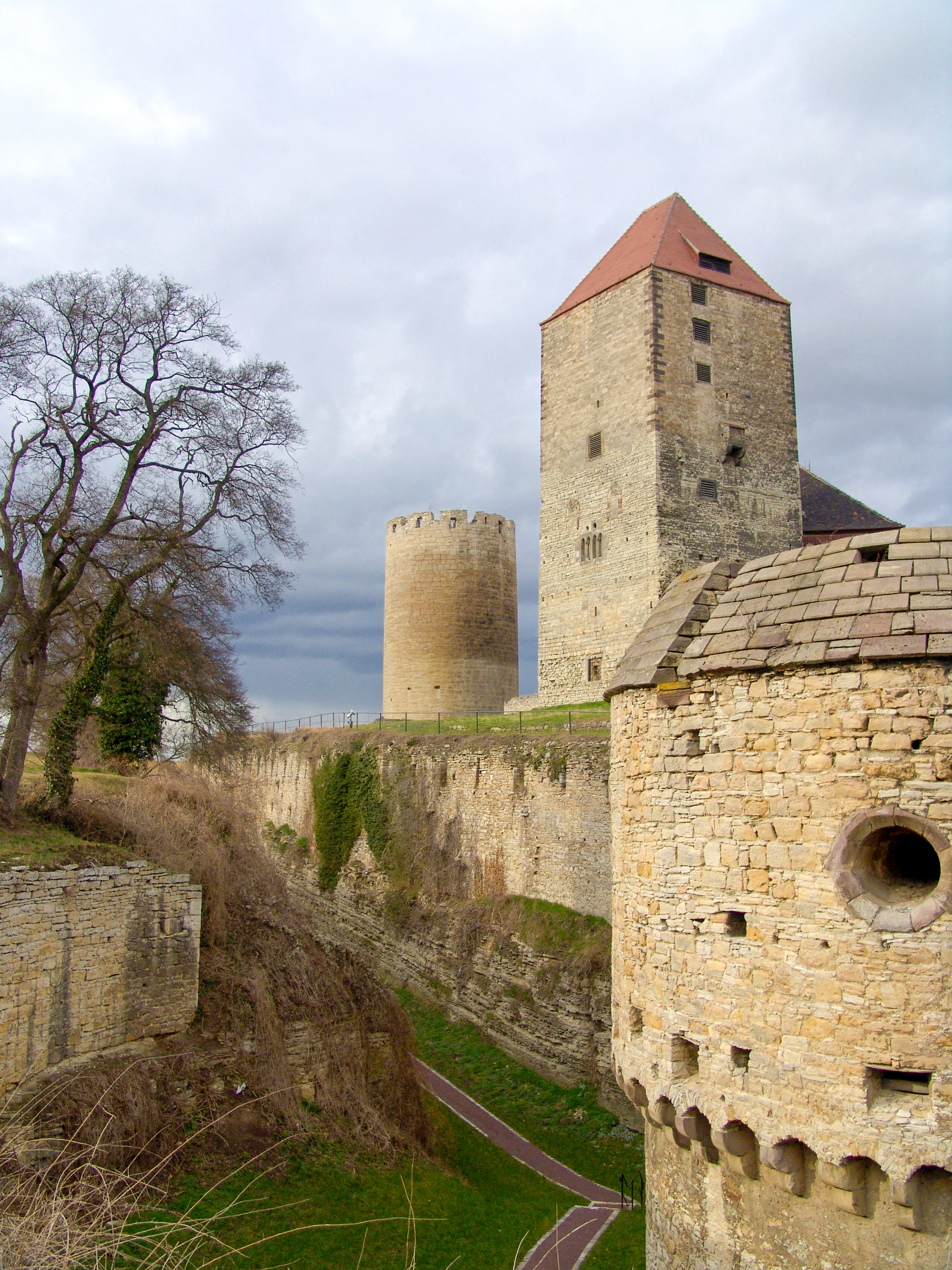 Burg Querfurt